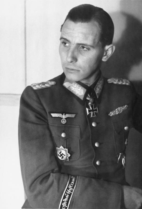 Abgebildete Personen: Remer, Otto-Ernst: Generalmajor, Ritterkreuz (RK), Heer, Vorsitzender der Sozialistischen Reichspartei (SRP), Bundesrepublik Deutschland (GND 119198908)